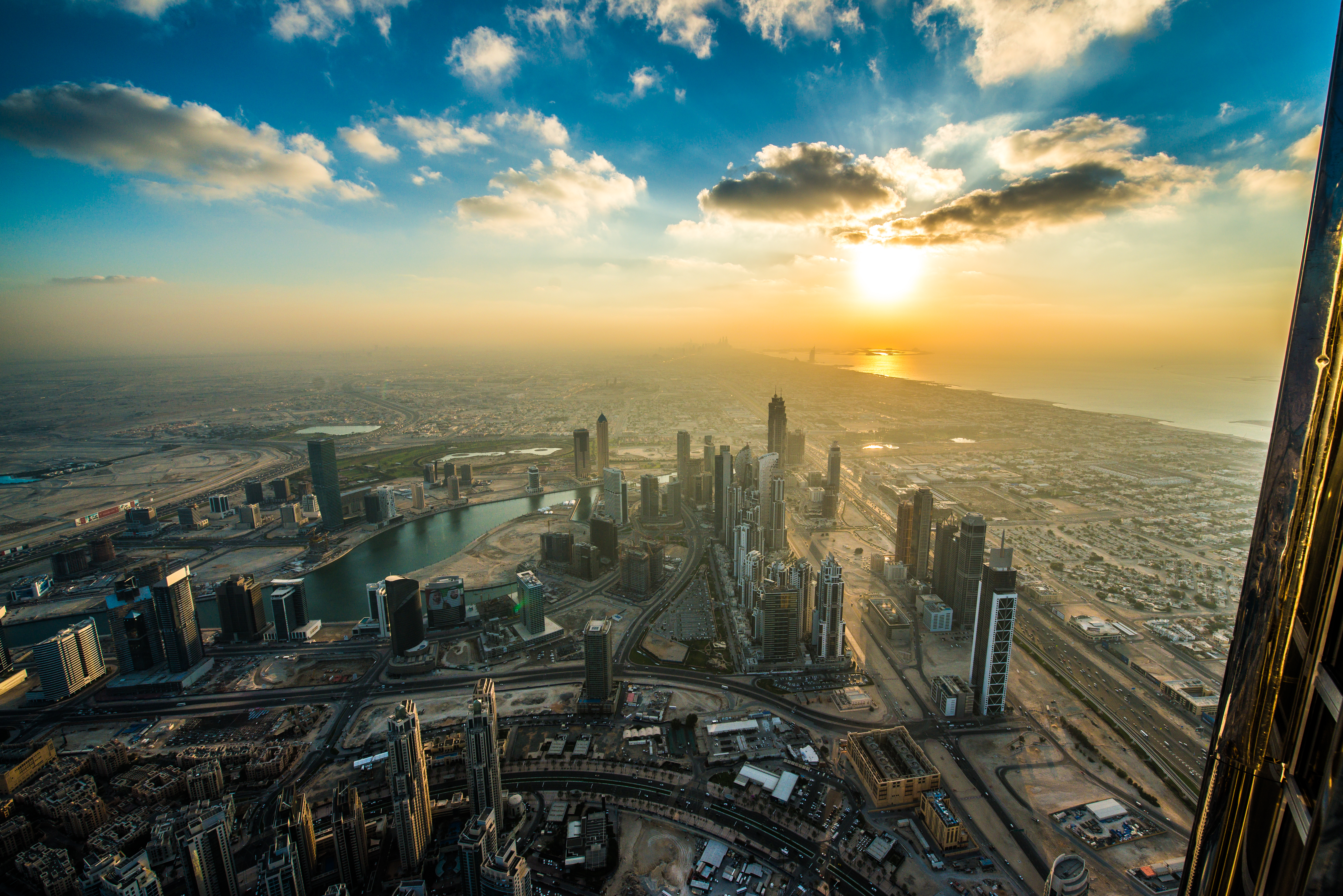 Dubai Sunset from Burj Khalifa.